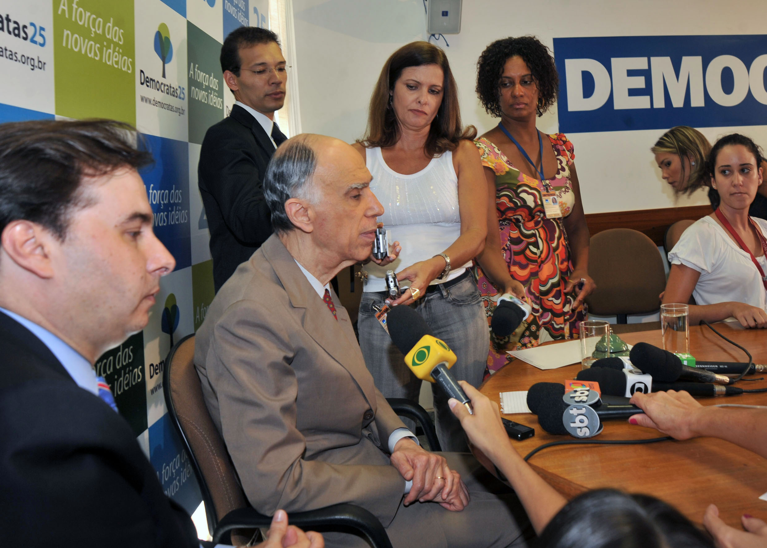 Brasília - Senador Marco Maciel, escolhido como interventor do DEM no diretório regional do partido do Distrito Federal, dissolvido pela Executiva Nacional